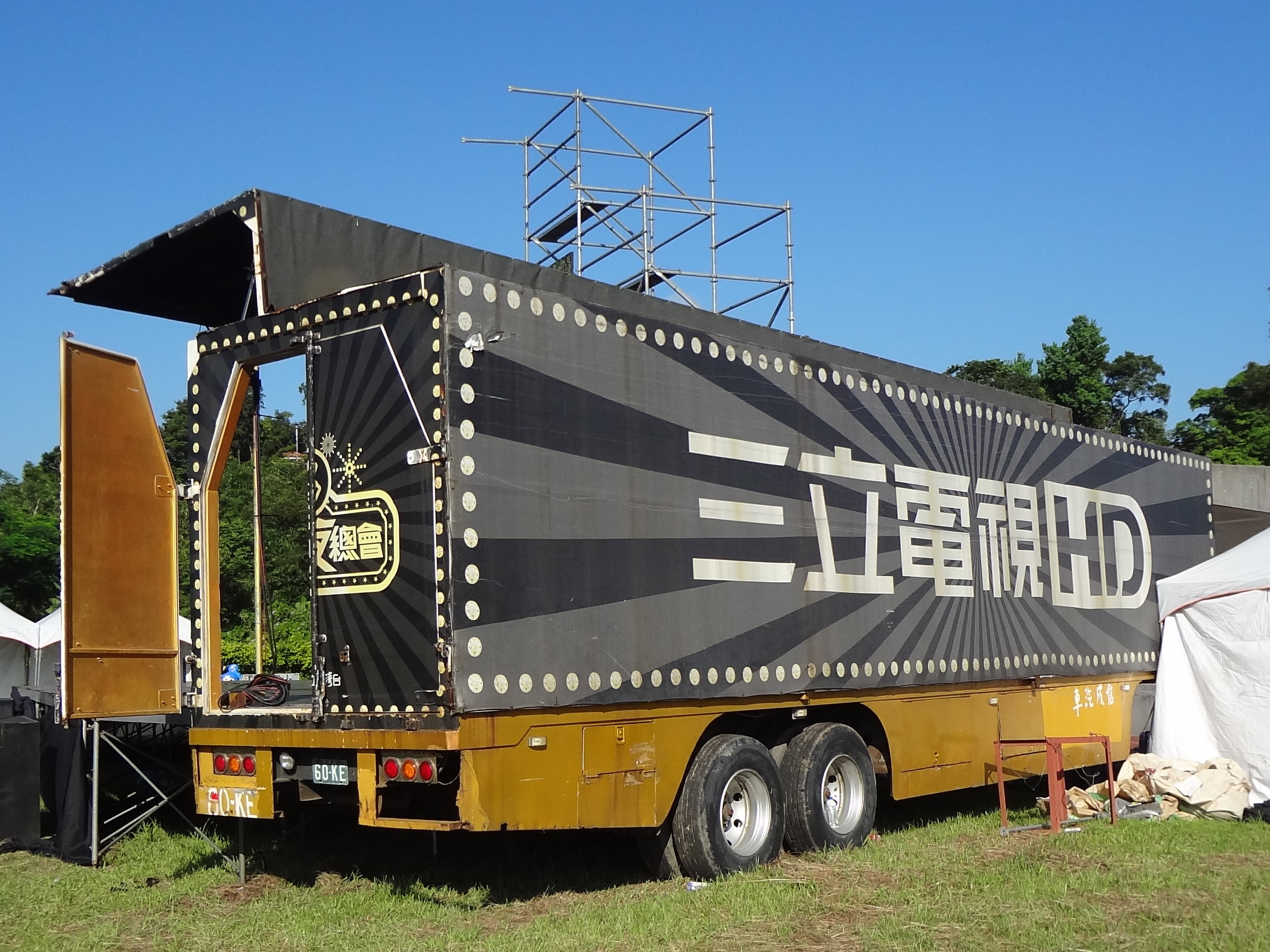 三立台灣台綜藝節目《超級夜總會》於基隆市七堵區堵南國民小學操場錄影結束，三立電視委外打造的《超級夜總會》舞台車60-KE。